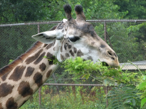 Masai Giraffe